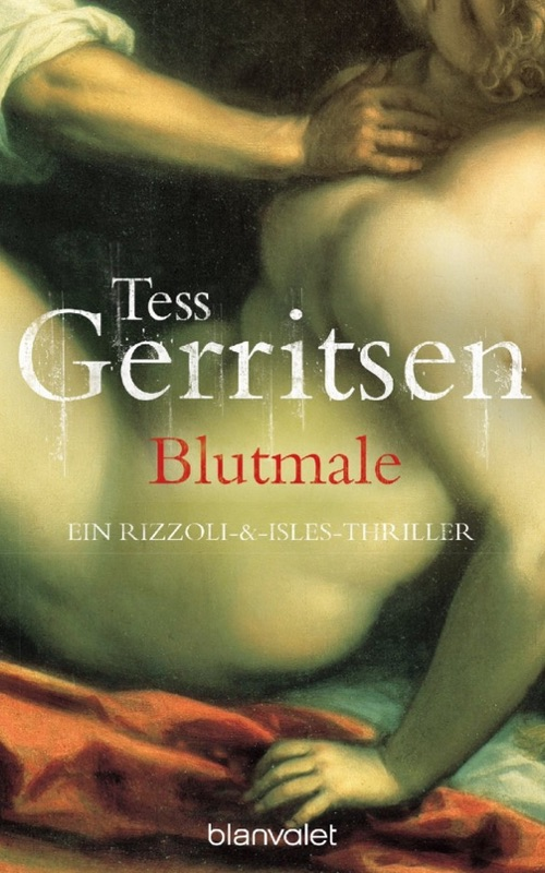 Tess Gerritsen: Blutmale. Blanvalet, München 2008. DNB